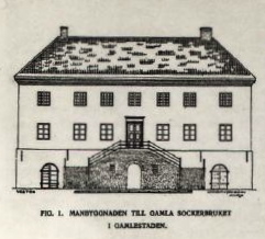 Manbyggnaden vid Gamla Sockerbruket, Ånäs landeri 1729. Bildarkivet vid Göteborgs stadsmuseum.